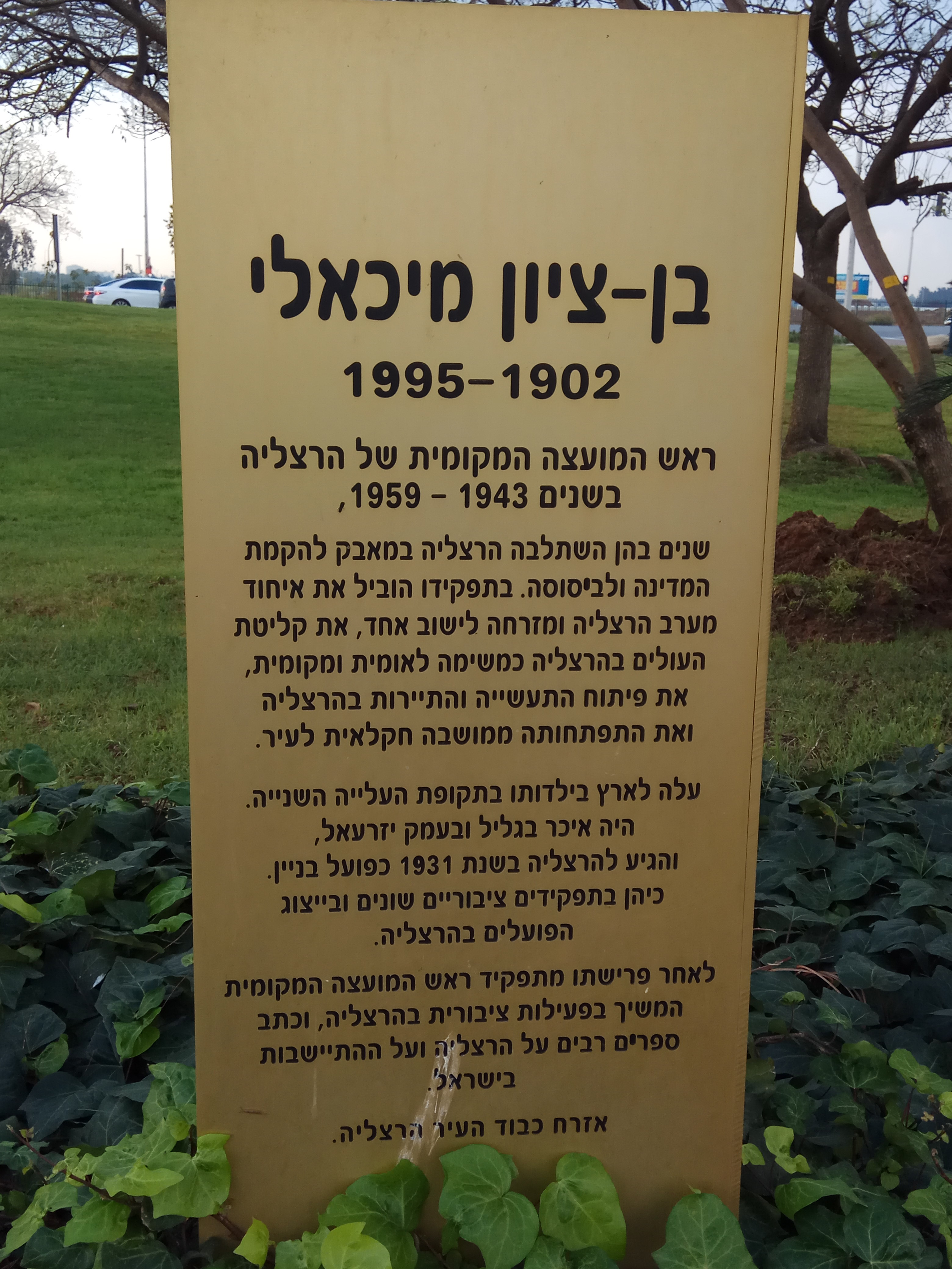 שלט הנצחה לבן ציון מיכאלי בהרצליה, ליד קניון שבעת הכוכבים